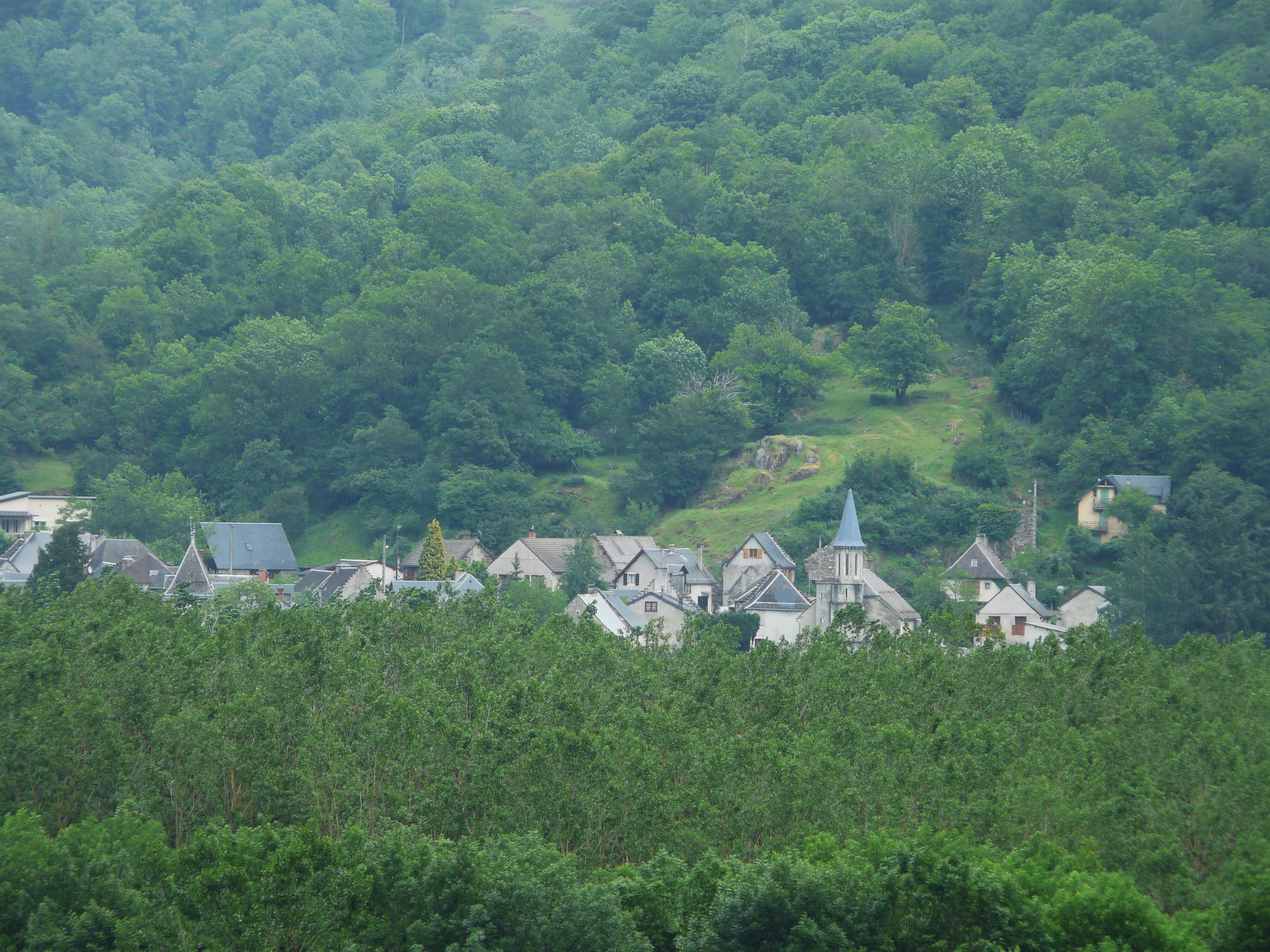 Le village de Lez vu depuis le village de Ladivert à Saint-Béat, Haute-Garonne, France.